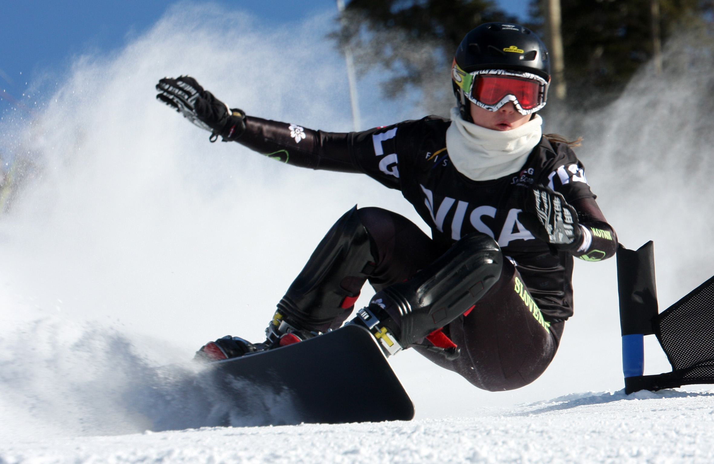 Telluride_PGS_Gloria_Kotnik_SLO